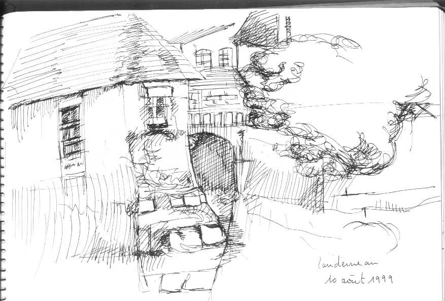 le pont habité de landerneau tel que je l'ai vu en 1999 et croqué à la plume